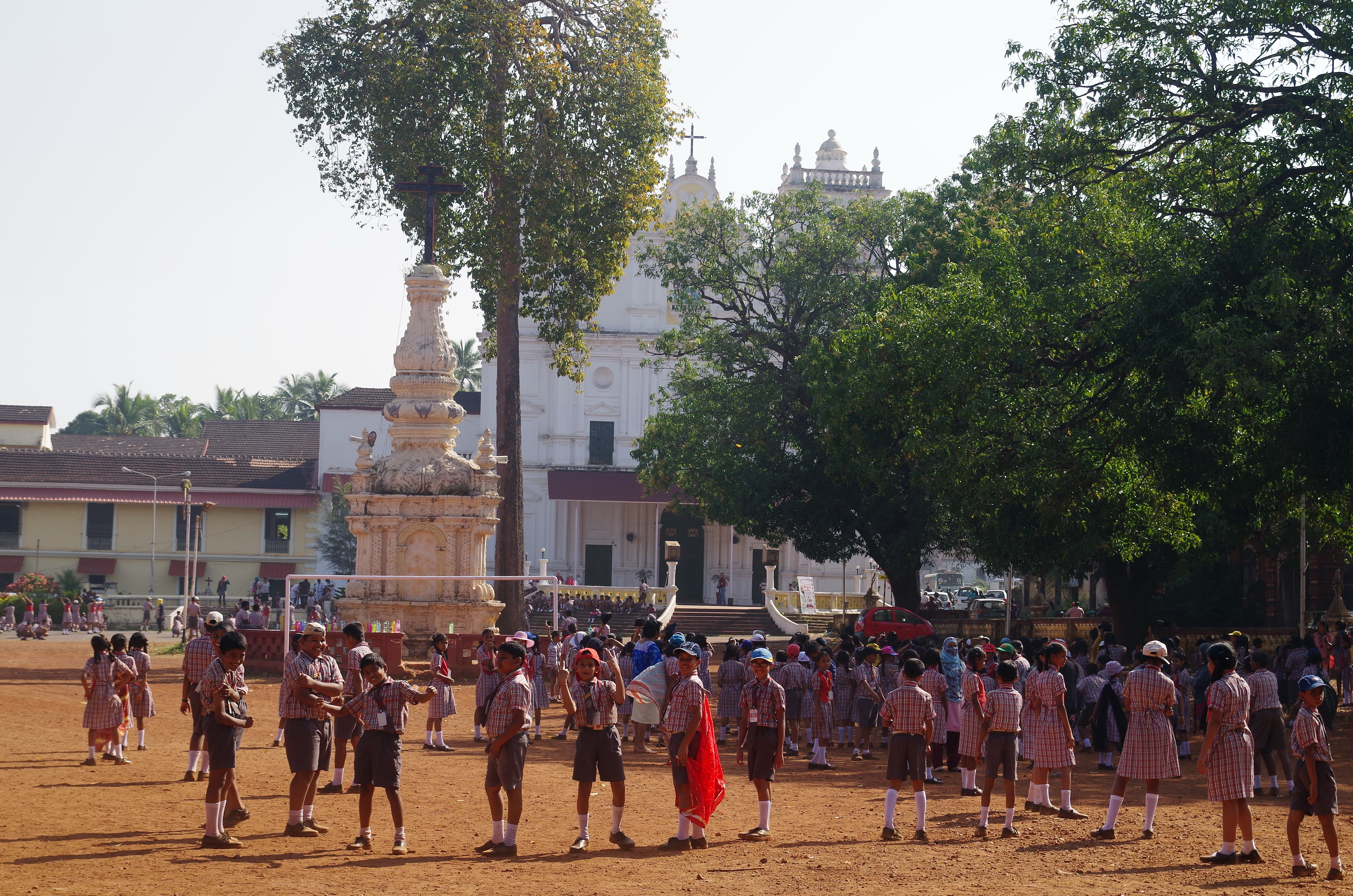 Margao, im Hintergrund die barocke Heilig-Geist-Kirche